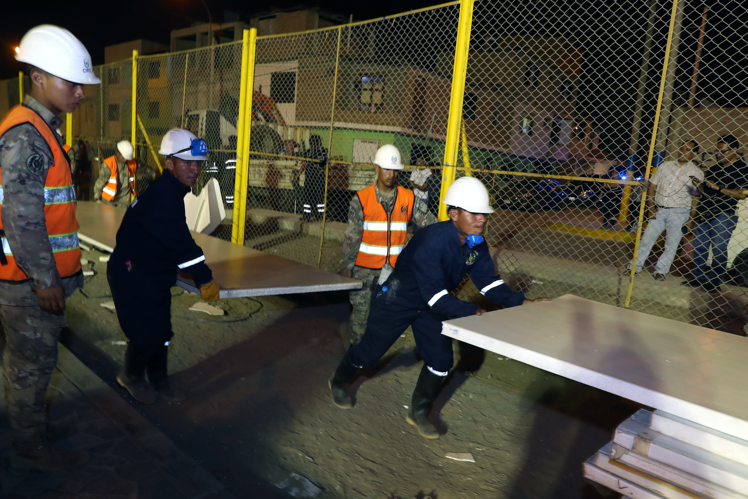 MINISTRO DE DEFENSA SUPERVISA INSTALACION DE MODULOS EN VILLA EL SALVADOR